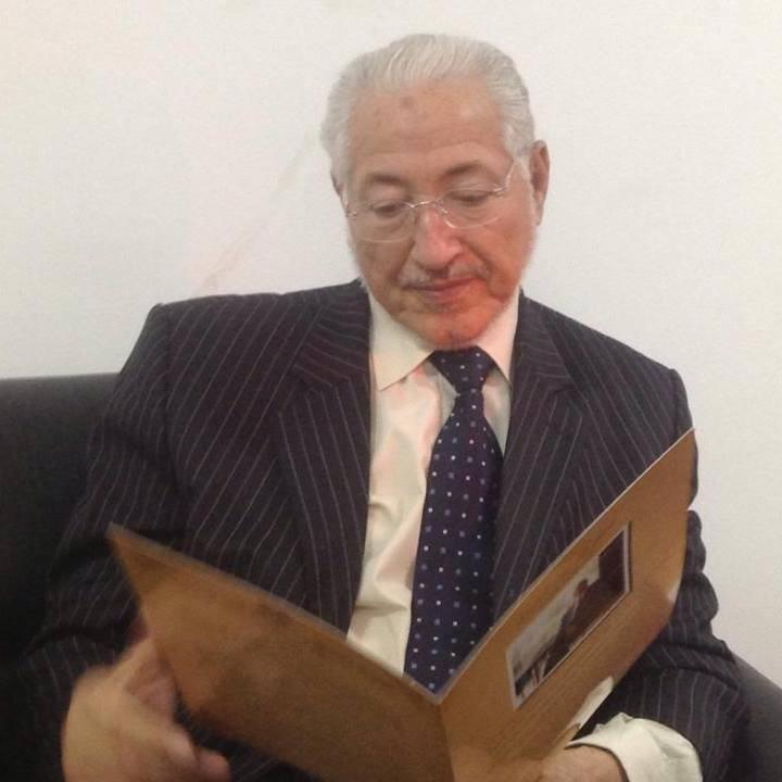 صورة شخصية للدكتور عبد المولى الشاعر الليبي